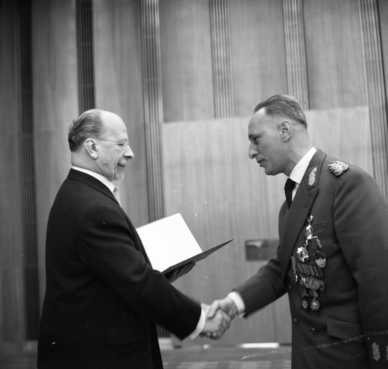 Berlin, Walter Ulbricht, Heinz Keßler Zentralbild/Kohls 1.3.1966 10 Jahre Nationale Volksarmee Berlin: Walter Ulbricht nahm Beförderungen vor Der Vorsitzende des Nationalen Verteidigungsrates der DDR, Walter Ulbricht, beförderte u.a. am 10. Jahrestag der NVA am 1.3.1966, den bisherigen Generalleutnant Heinz Kessler (rechts), Stellvertreter des Ministers für Nationale Verteidigung, auf Grund seiner Verdienste zum Generaloberst. Abgebildete Personen: Ulbricht, Walter: Staatsratsvorsitzender, Erster Sekretär des Zentralkomitees (ZK) der SED, Vorsitzender des Nationalen Verteidigungsrates, DDR Keßler, Heinz: Minister für Verteidigung, Armeegeneral, DDR (GND 119196719)